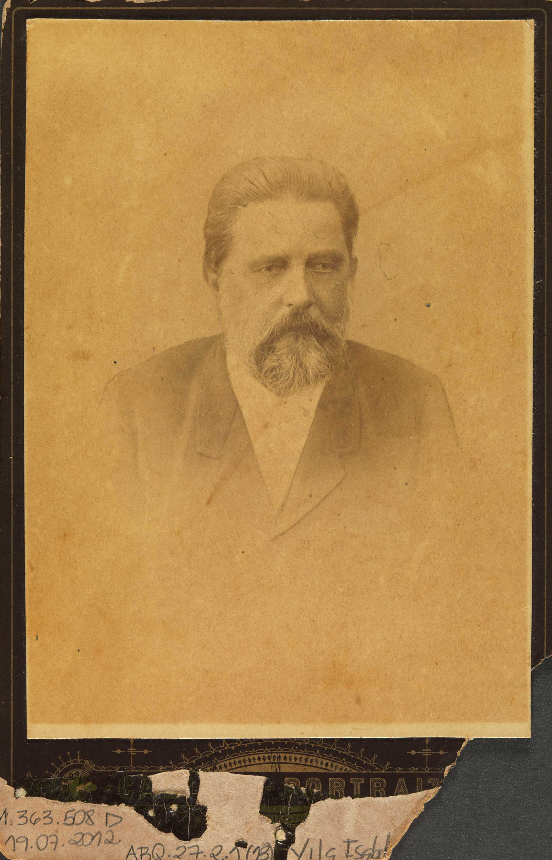 Título [Barão de Drummond / Estabelecimento Photographico A. Faria Antiga Caza Modesto R. Ourives, nº69 - Rio de Janeiro. Imprenta [S.l.: s.n.].